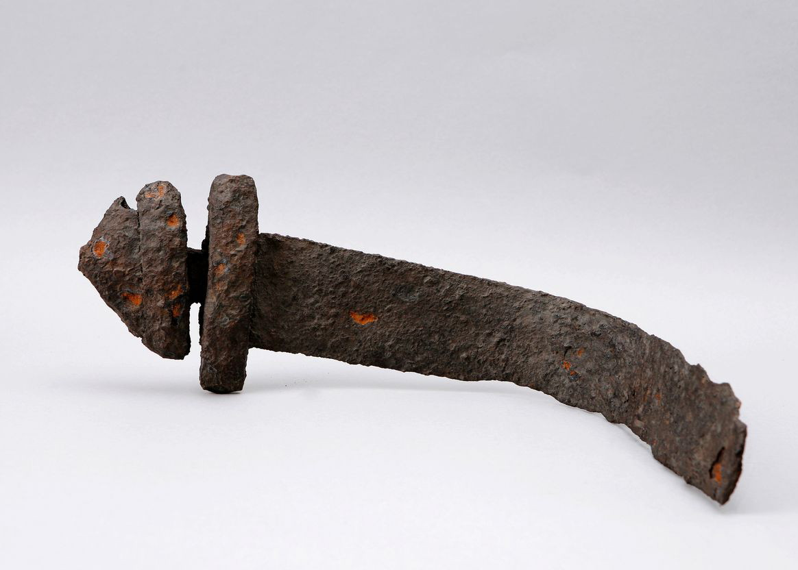 Vikingasvärd från utgrävningarna på Årstafältet i slutet av 1950-talet